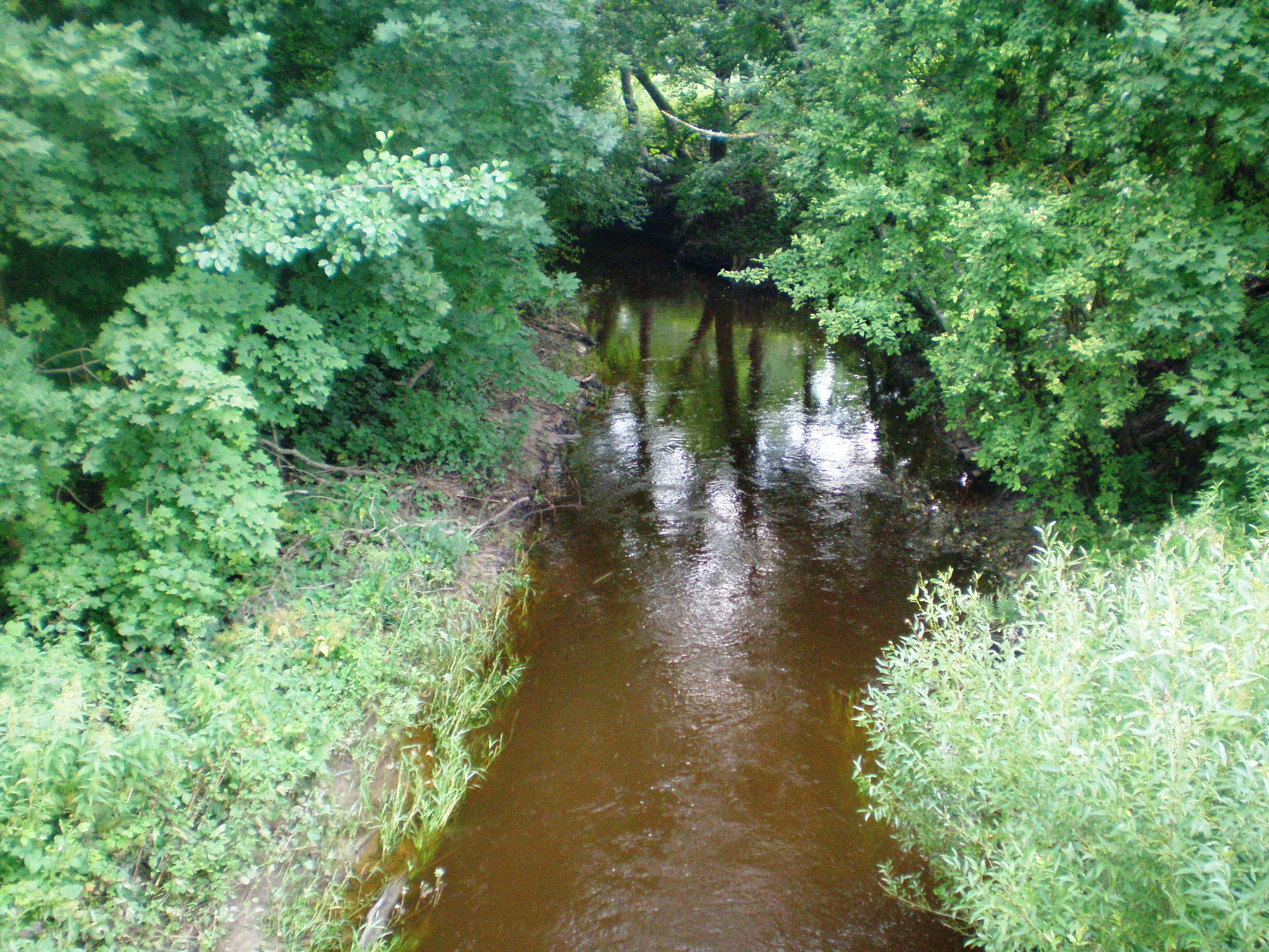 Vidauja river